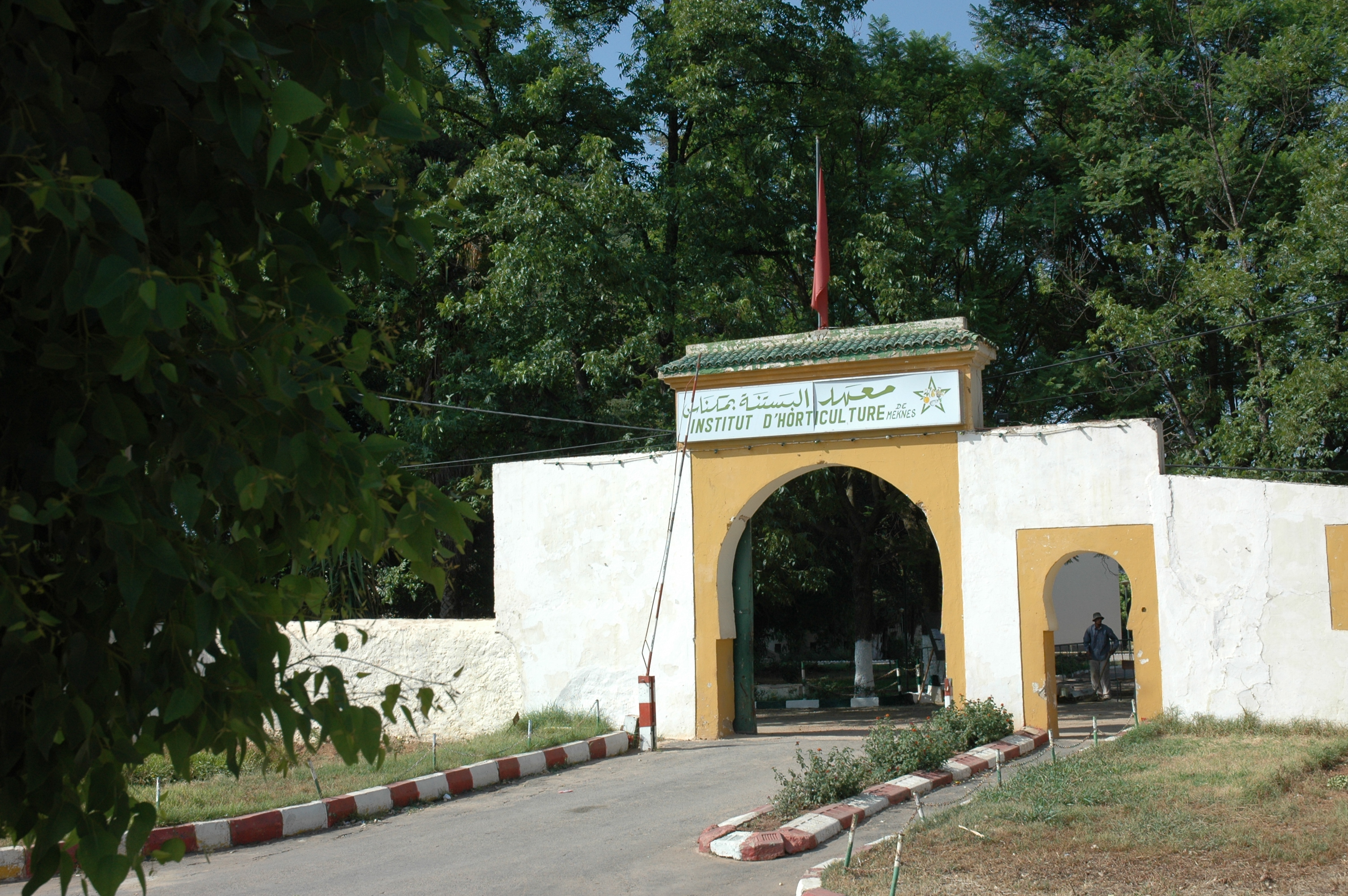 Entrée de l'Institut de techniciens spécialisés en horticulture - Meknès